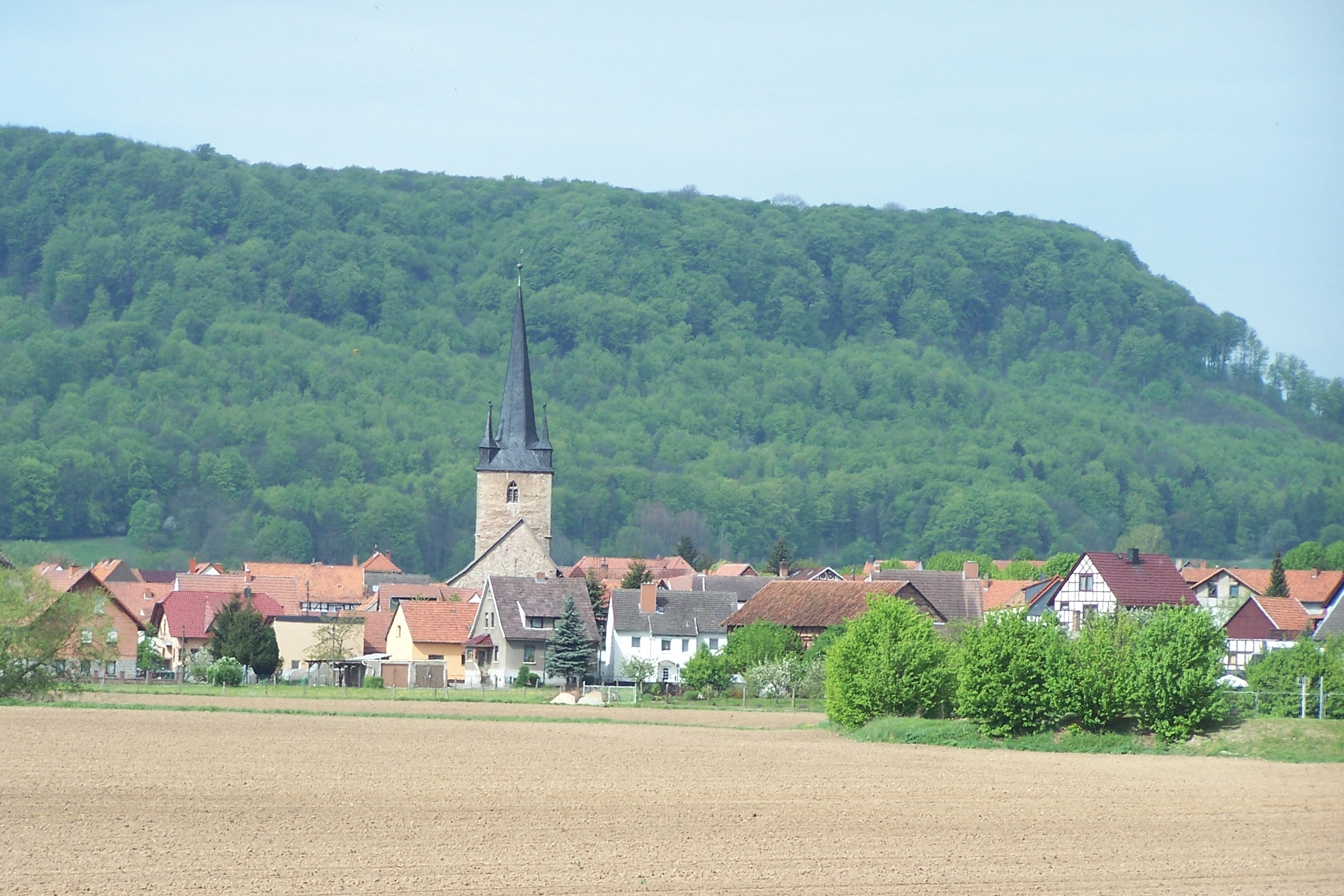 Die Ortslage Falken, Ansicht von Osten (Weg nach Frankenroda).